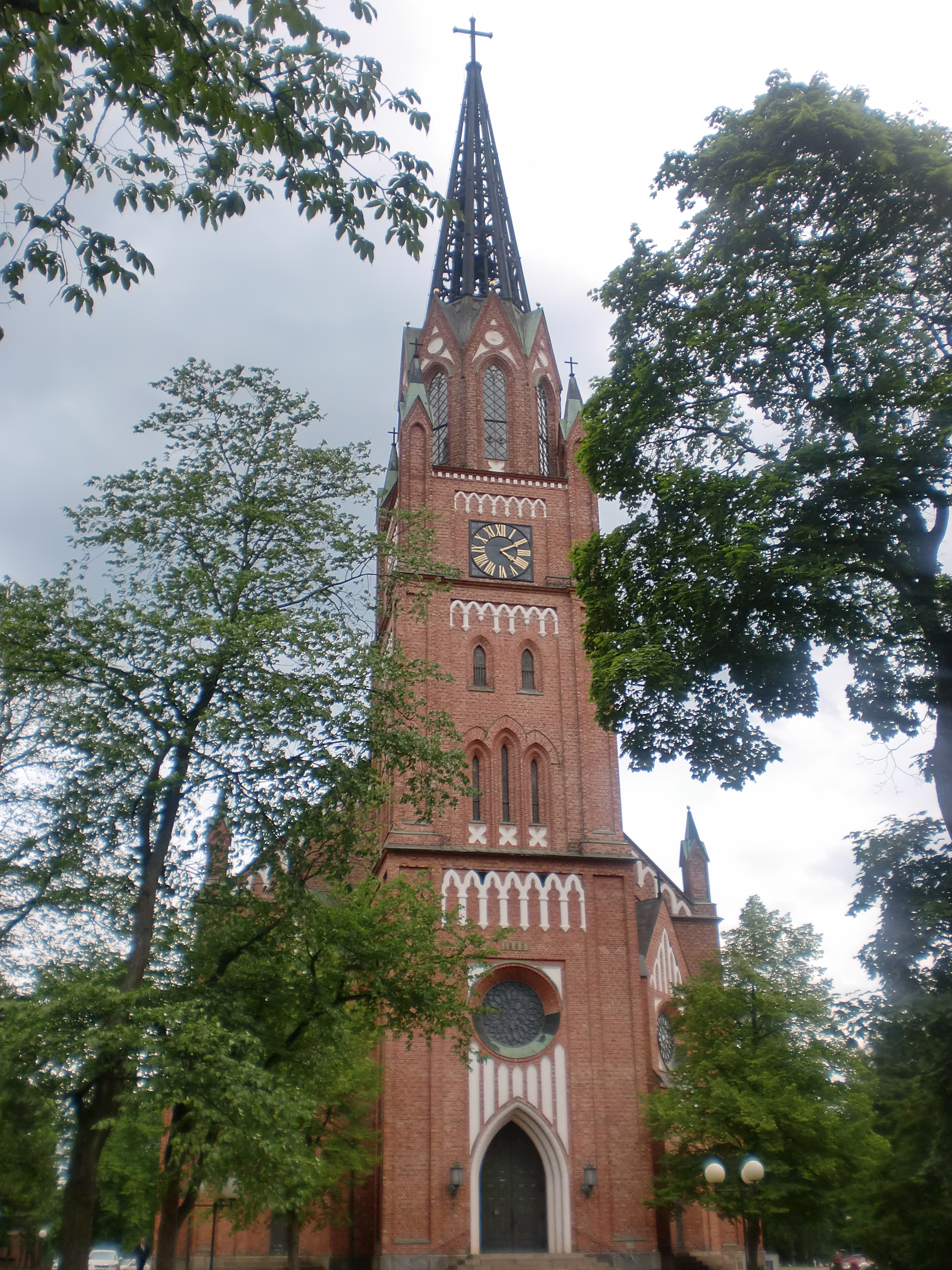 Keski-Porin kirkko